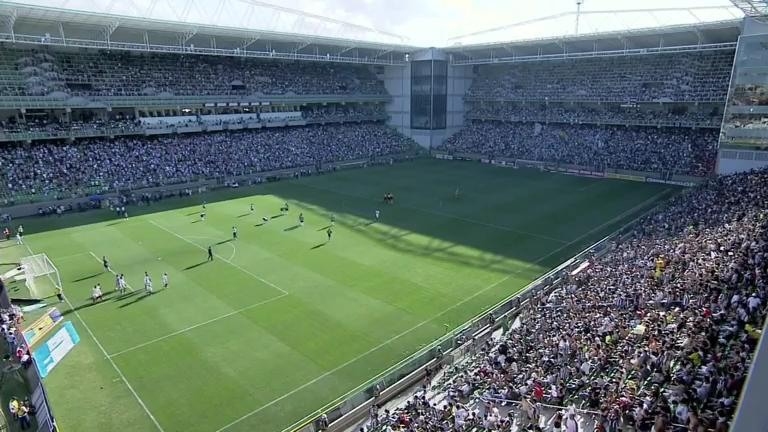 Foto do Independência em um jogo do Atlético-MG